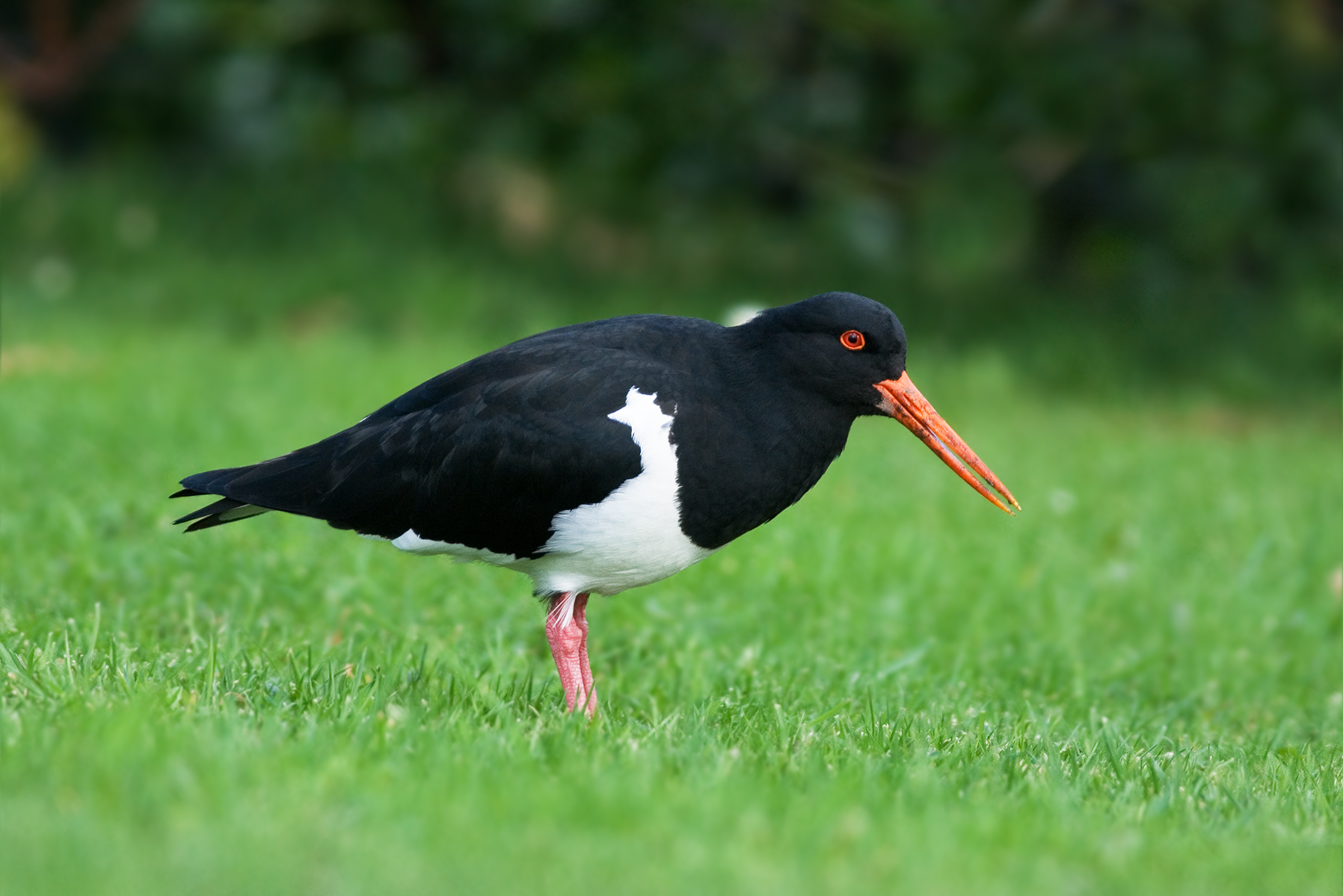 1.2 only